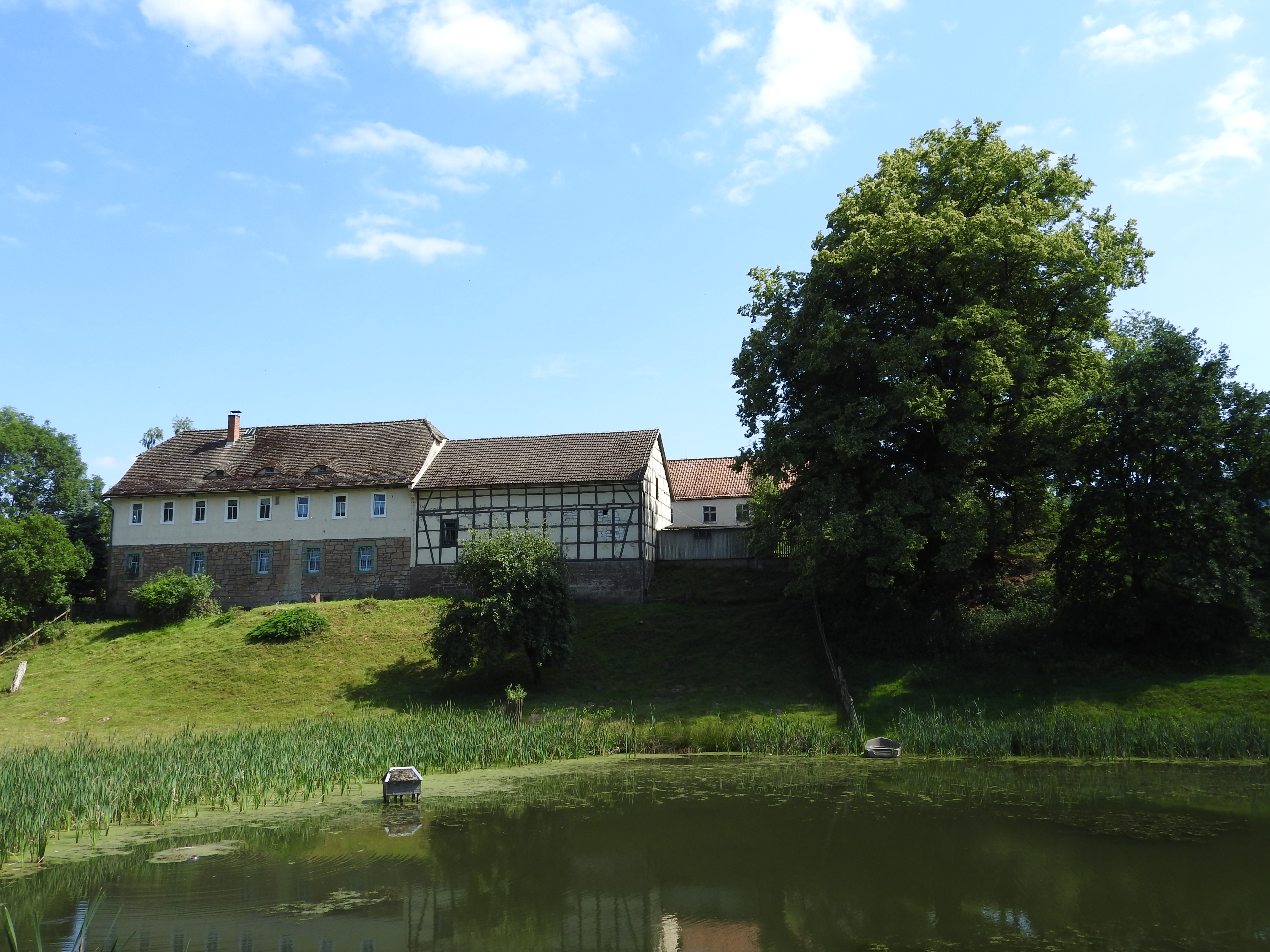 Teich in Schimmersburg, Thüringen